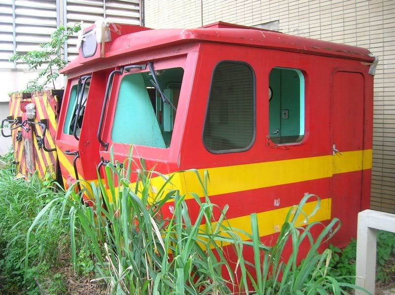 Cabine da Locomotiva 9E fabricada pela G.E.C. Traction Ltd., adquirida pela RFFSA para a Ferrovia do Aço e atualmente esquecida em um galpão ferroviário, em Cruzeiro (SP).